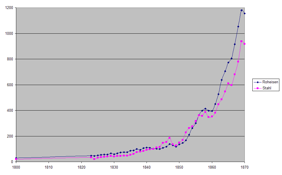 Eisen- und Stahlerzeugung in Preussen 1800-1870 (Zahlen nach Sozialgeschichtliches Arbeitsbuch 1, S.67-73